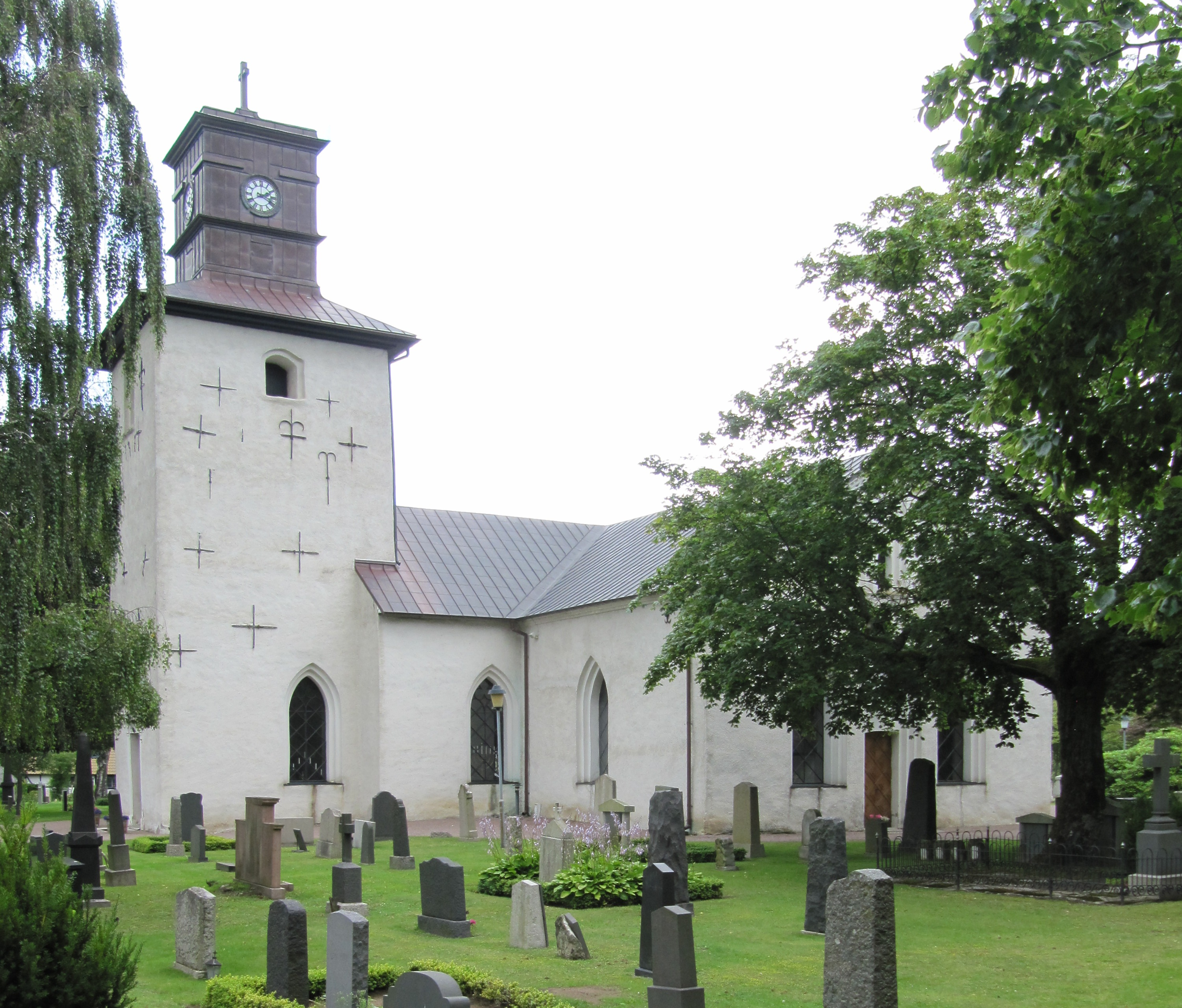 Strövelstorps kyrka från söder